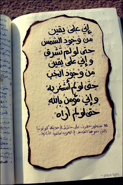 إني على يقين من وجود الشمس حتى لو لم تشرق وإني على يقين من وجود الحب حتى لو لم أشعر به وإني مؤمن بالله حتى لو لم أراه